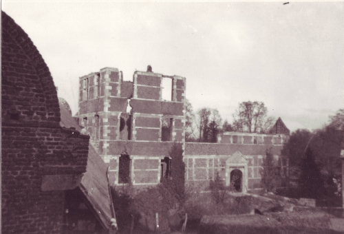 Schloß Leerodt